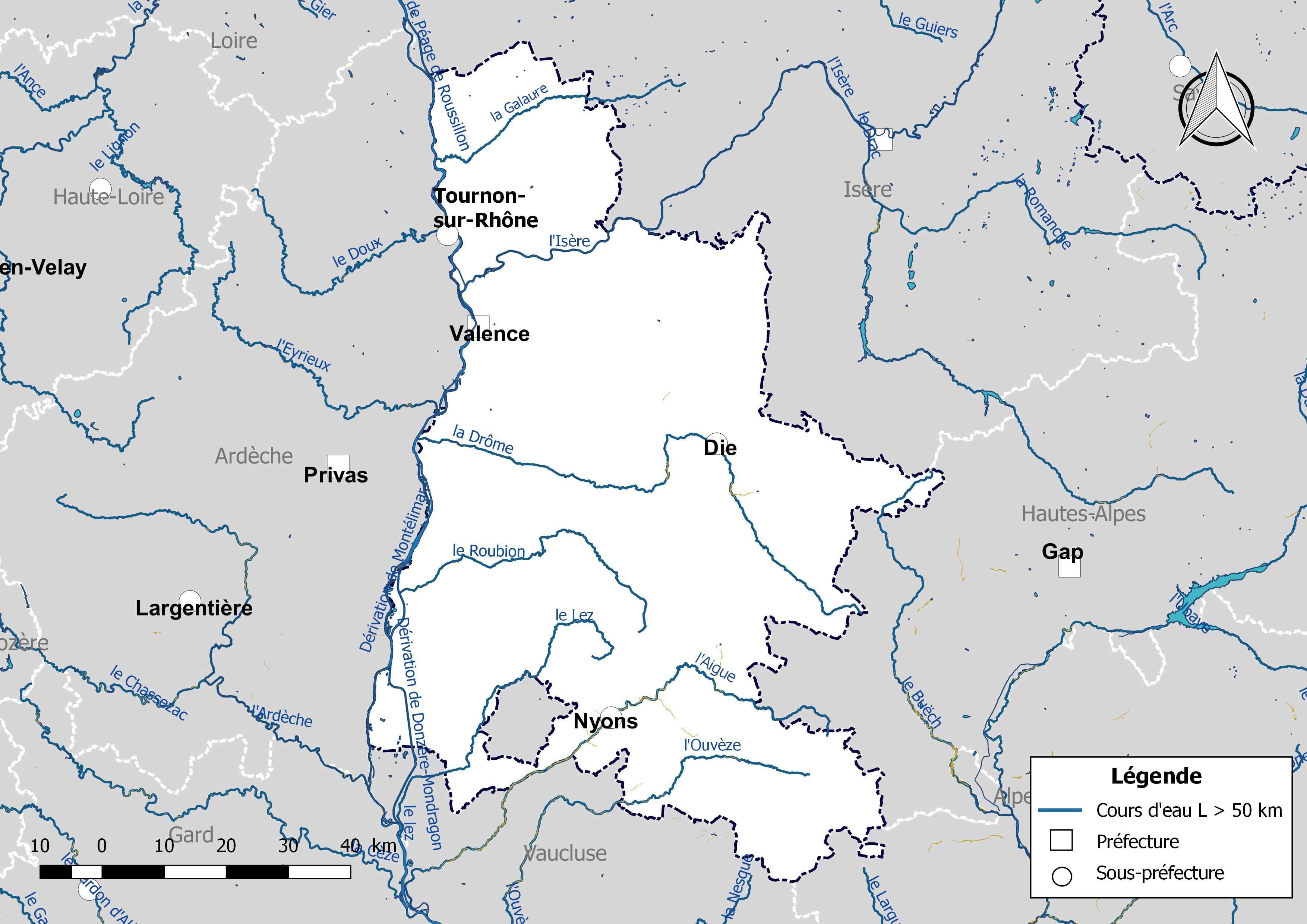 Carte des cours d'eau de longueur supérieure à 50 km drainant le département de la Drôme (France).